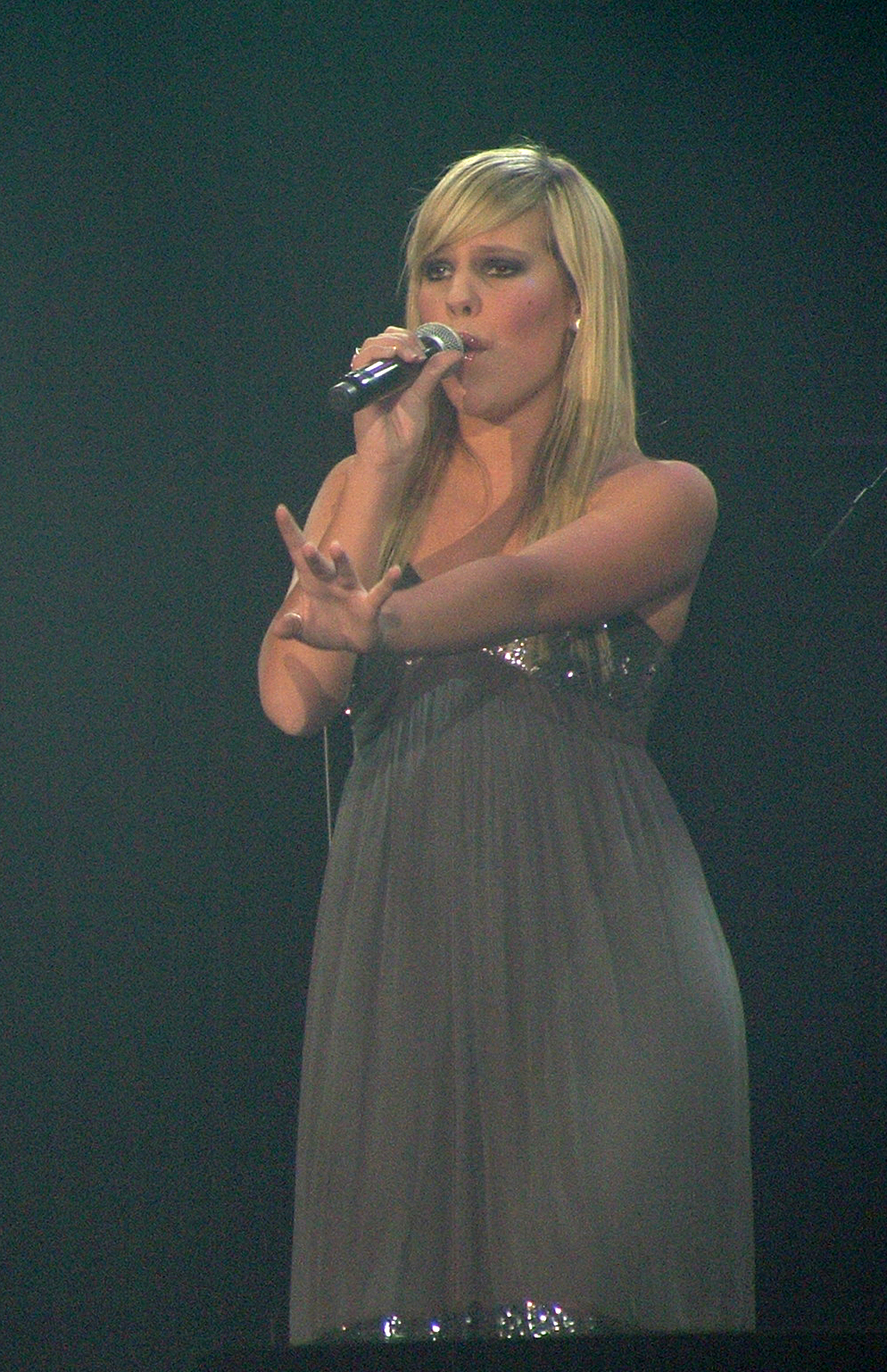 Eline De Munck tijdens Steracteur Sterartiest Live on Stage op 1 februari 2008 in de Lotto Arena Antwerpen.